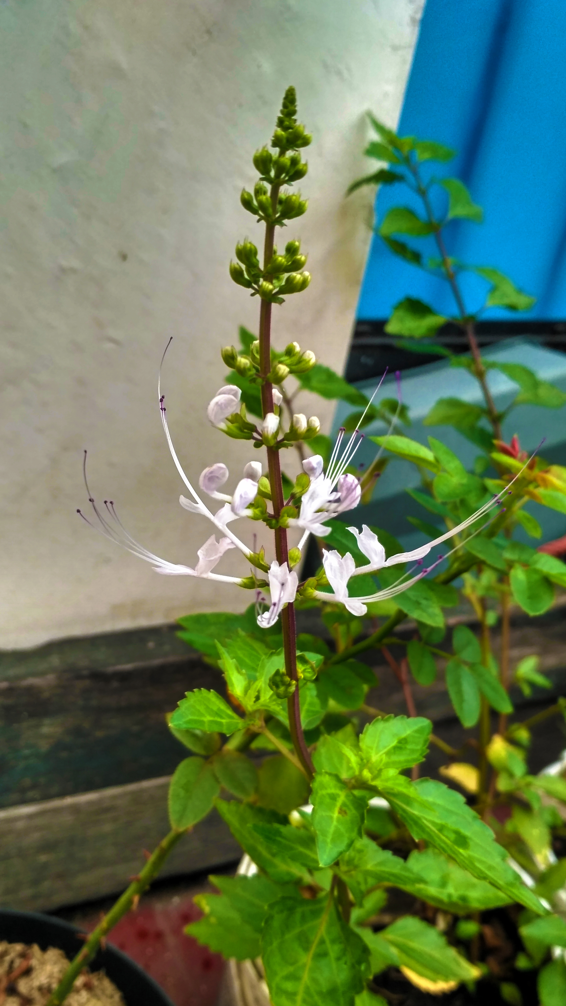 Kumis kucing (Orthosiphon aristatus) yang sedang berada dalam proses pemekaran bunga. Bunga matang dan bunga yang belum matang dapat dibedakan dengan jelas.